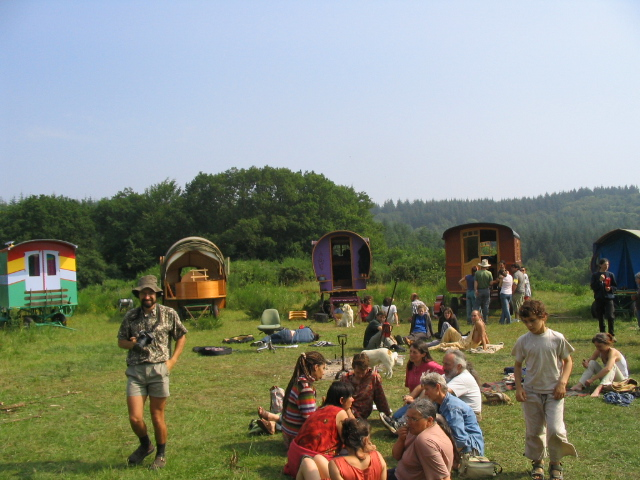 photo représentant des roulottes en centre bretagne lors de la fête d'inauguration.